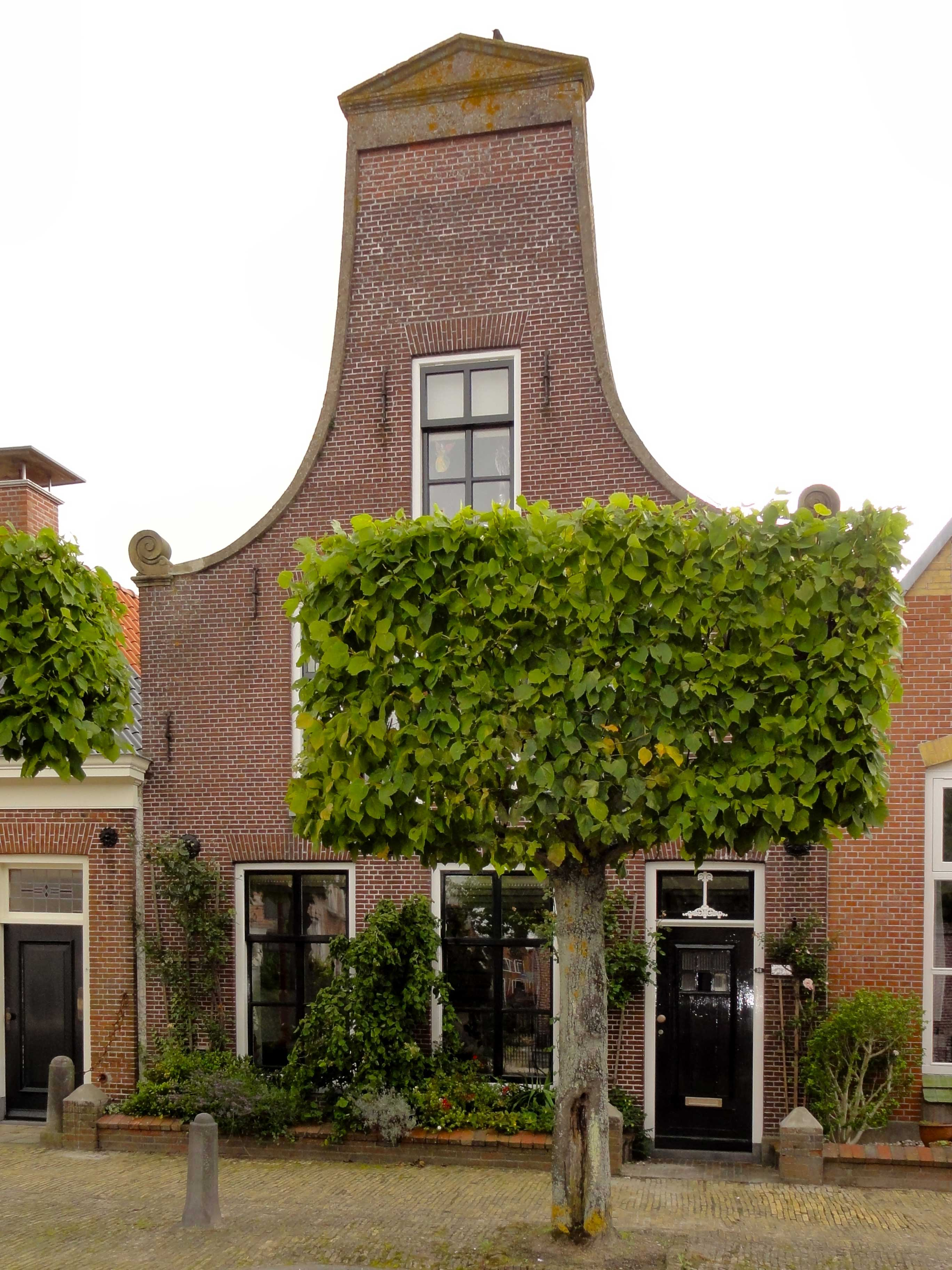 Bleekstraat 38 Makkum